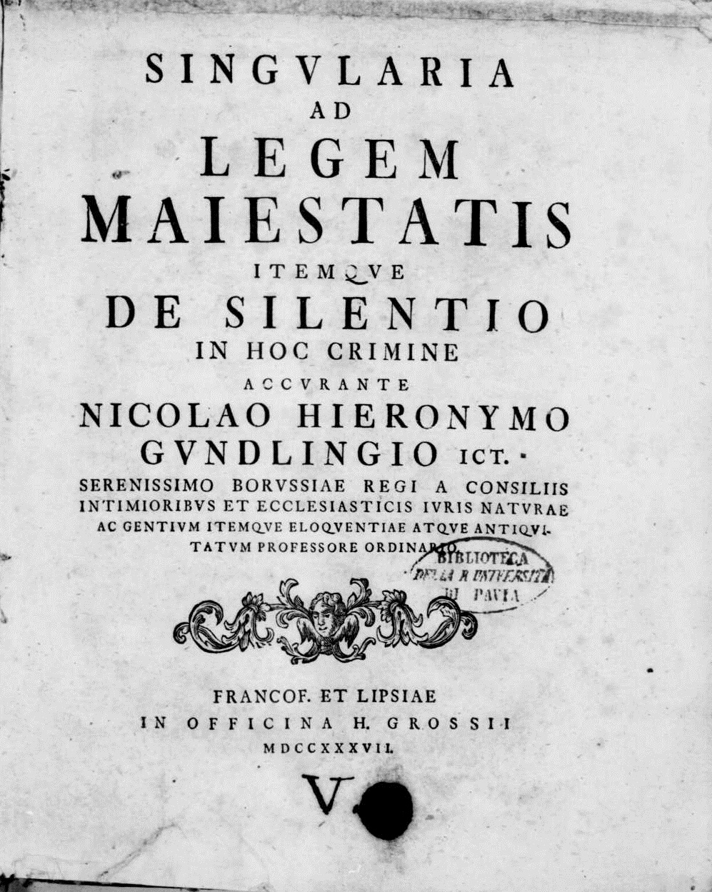 Frontespizio